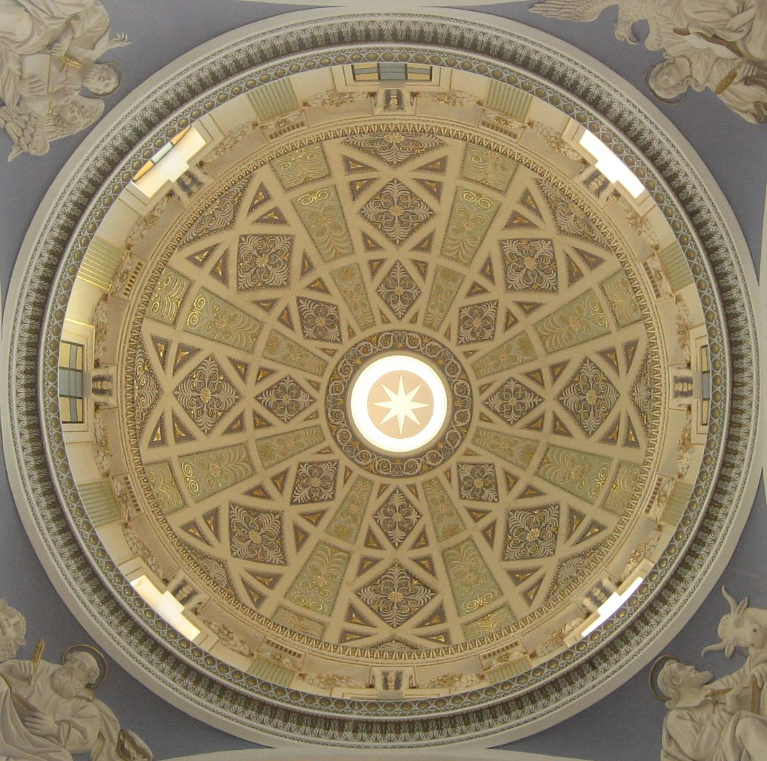 Ispica, Basilica della Santissima Annunziata, interno: vista dell'interno della cupola.